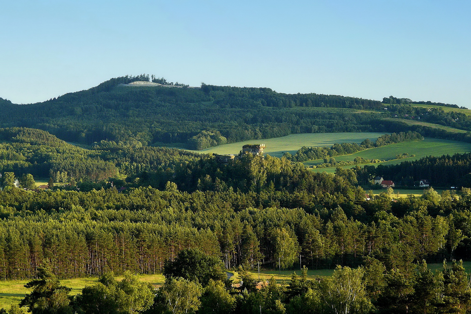 Hrad Jestřebí a Maršovický vrch od Puchavce